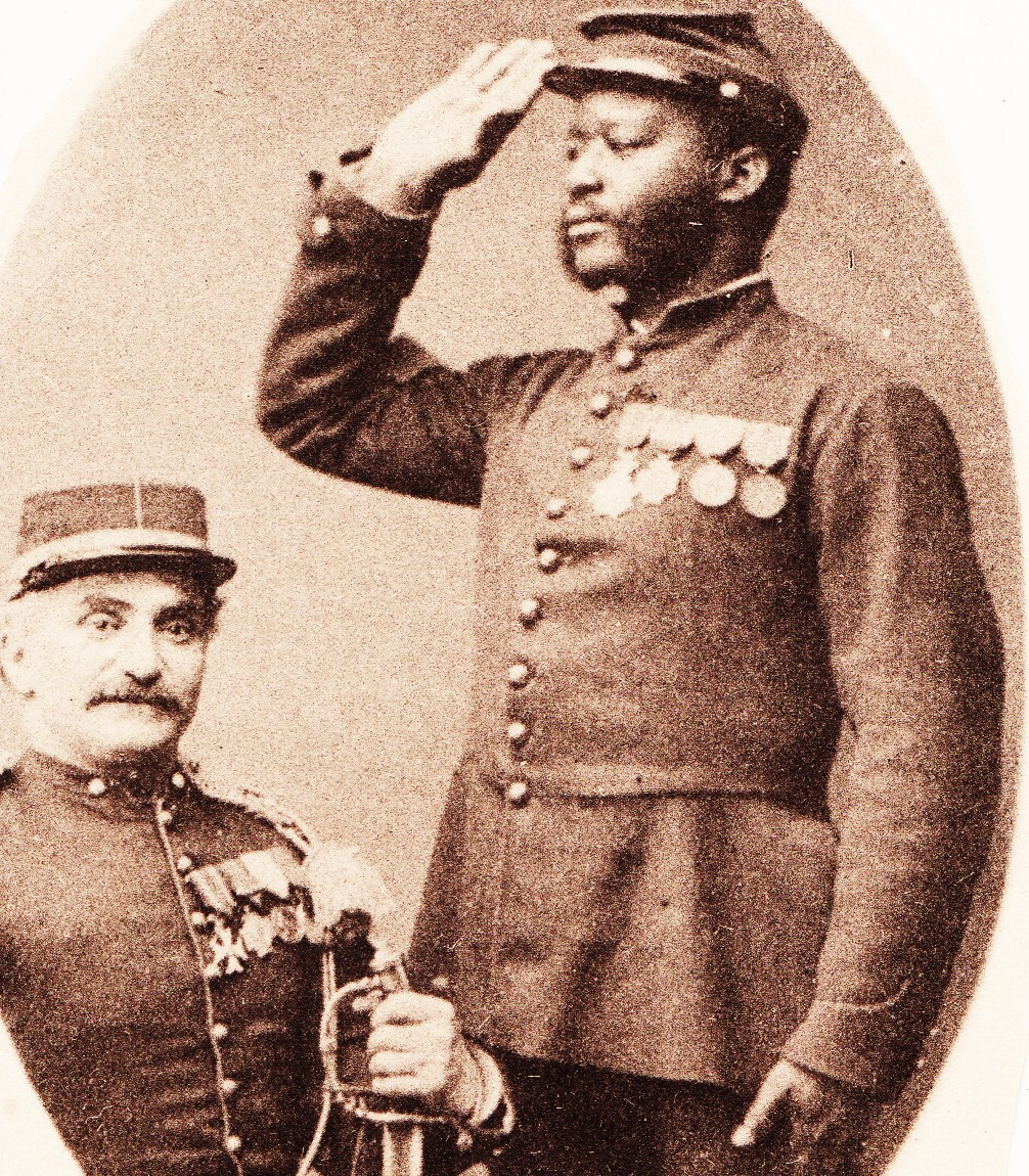 Korporaal de Leeuw